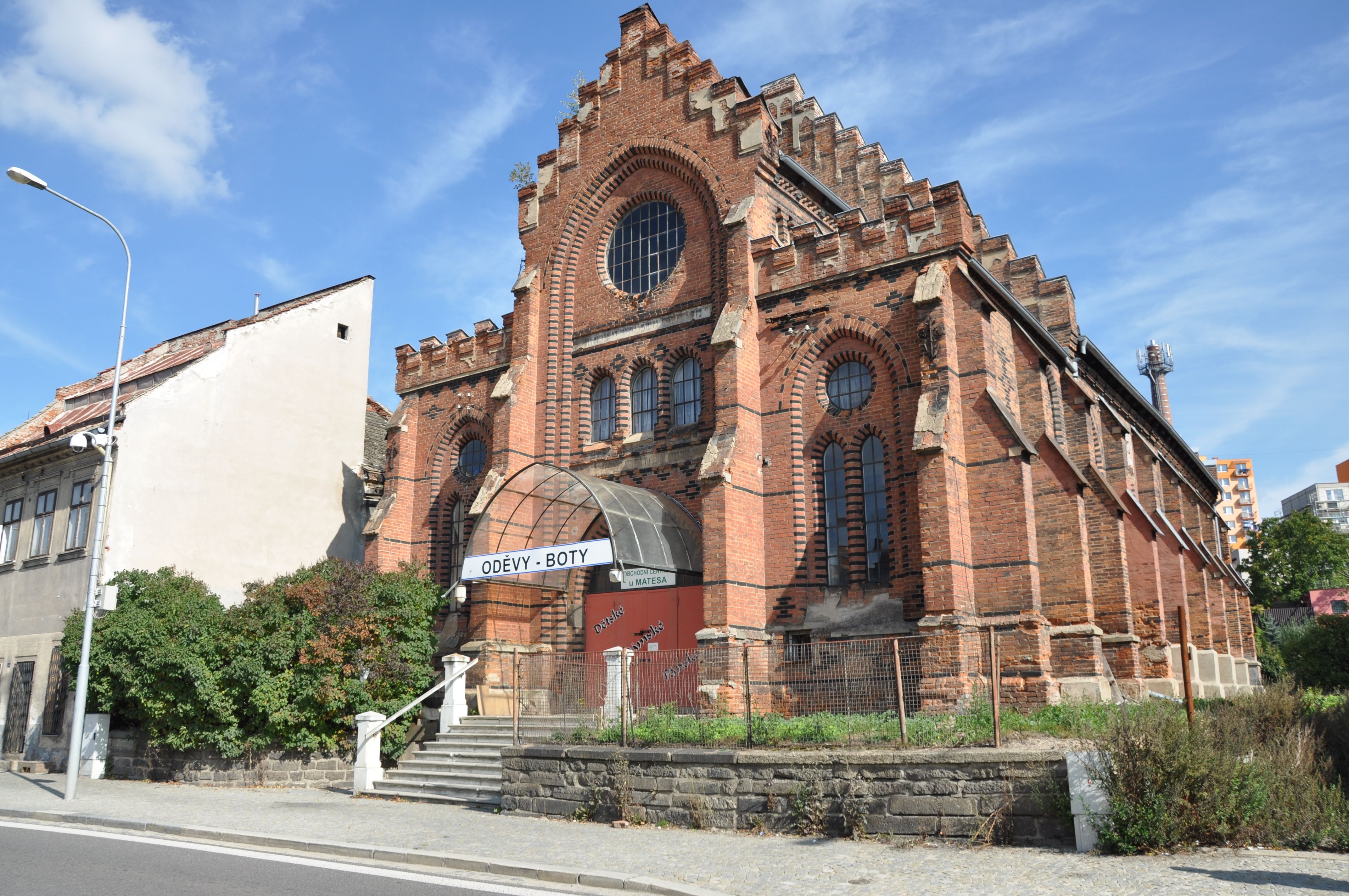 Nová synagoga ve Velkém Meziříčí